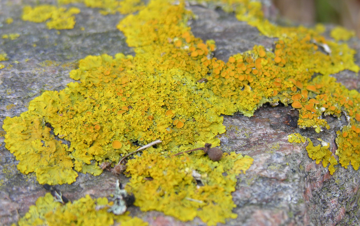 Sieninė geltonkerpė (Xanthoria parietina) Foto: Algirdas, 2005 m. lapkričio 5 d.